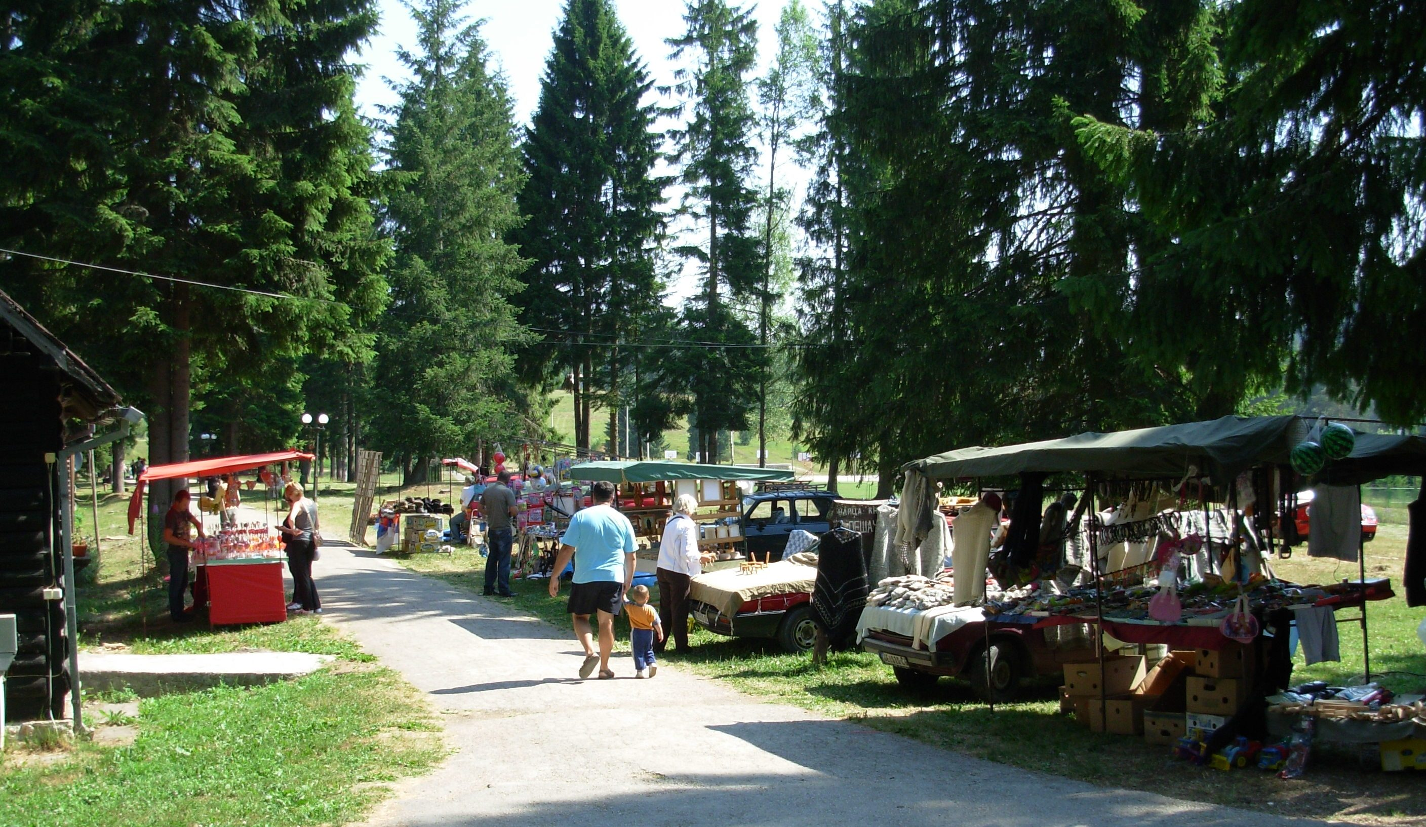 Vašar na Mitrovcu na Tari. Slikao Goldfinger